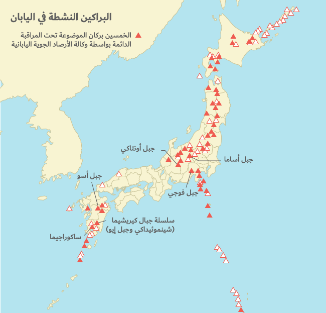 البراكين في اليابان أنواعها وفائدتها